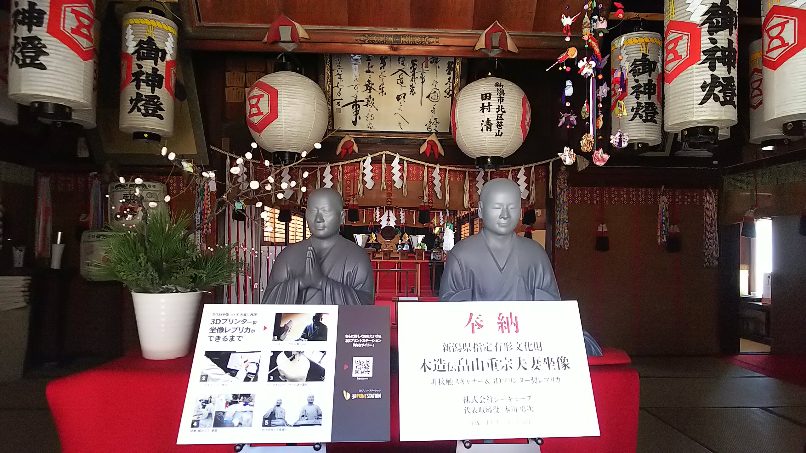 新潟市蒲原神社にある３Dプリンターにて復元された仏像。